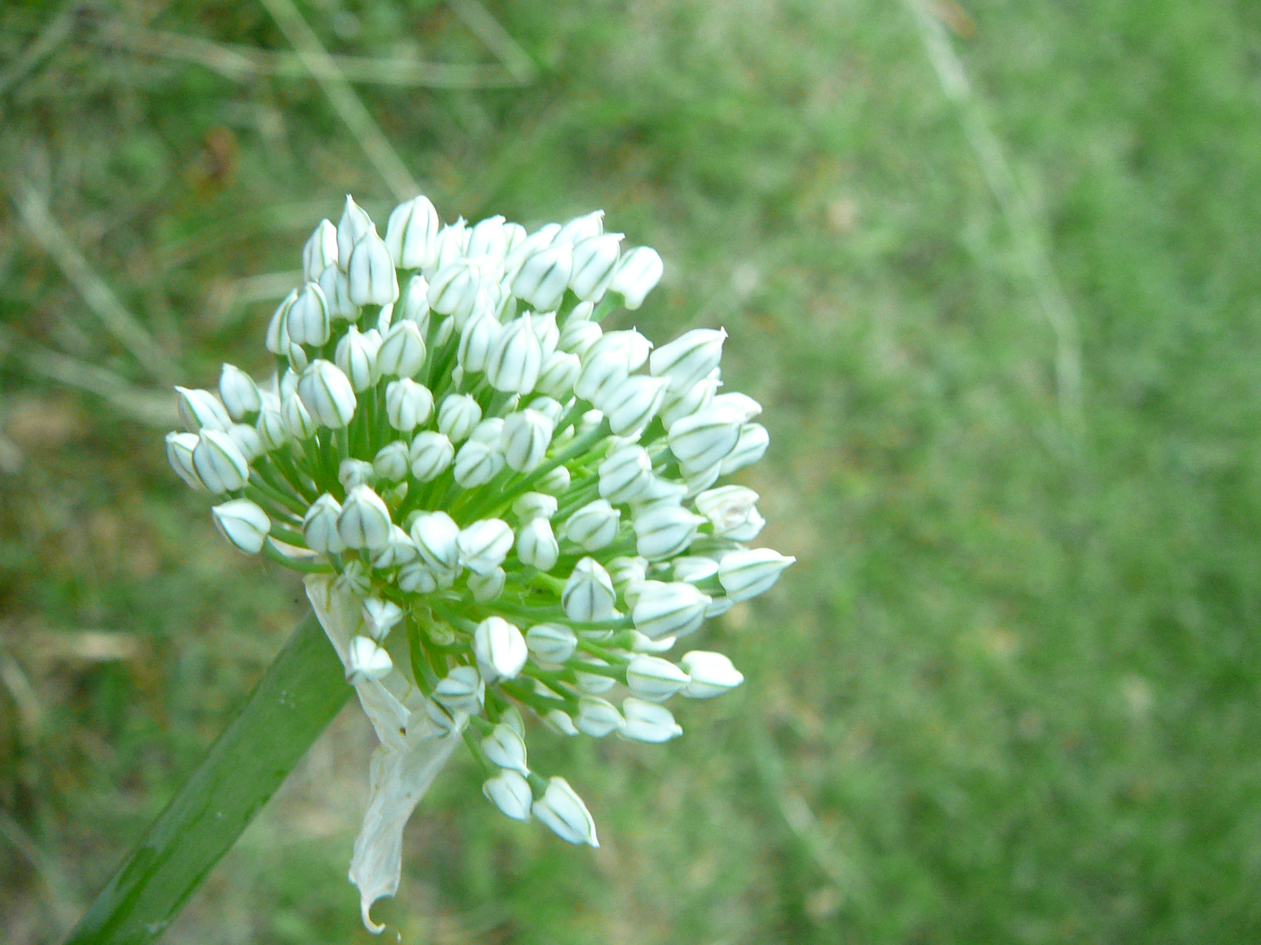 Kwiatostan cebuli zwyczajnej